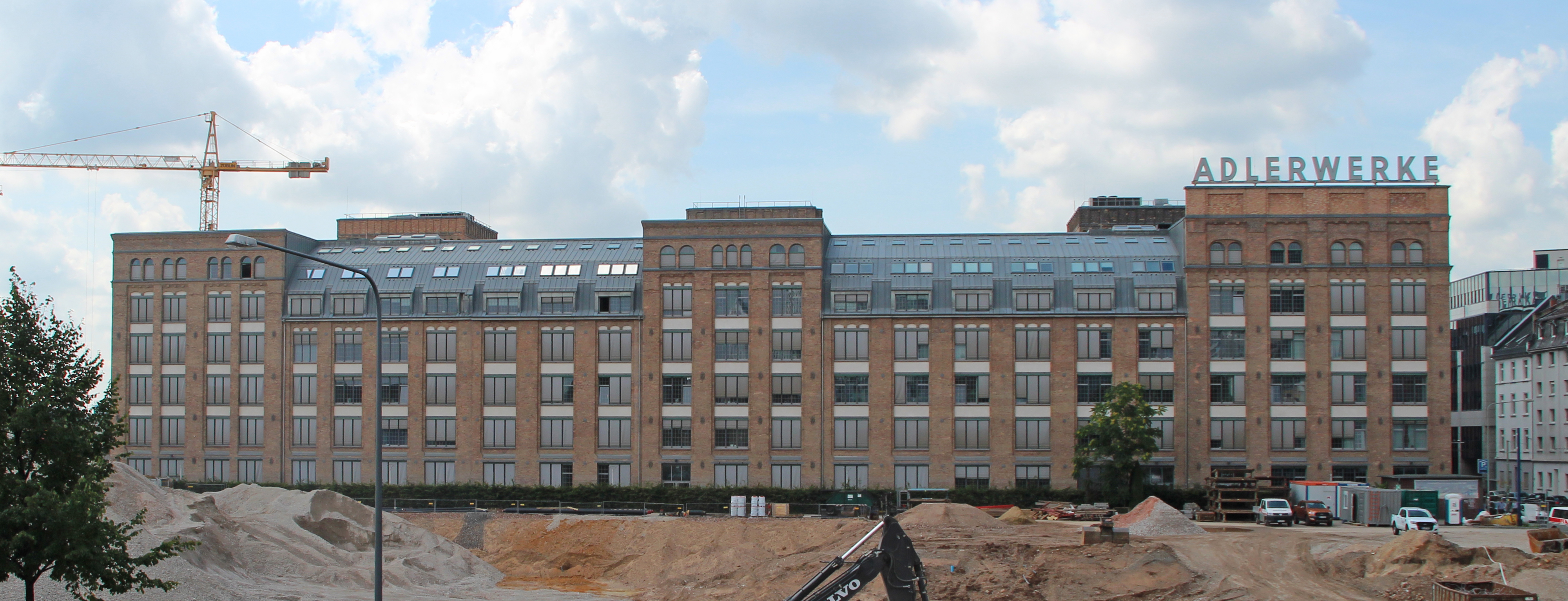 Bildinhalt: Die Nord-Ost-Seite der Adlerwerke im Gallusviertel, gesehen von der Weilburger Straße aus über eine Baustelle hinweg Aufnahmeort: Frankfurt am Main, Deutschland